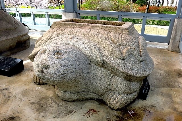 韓國首爾蠶室三田渡碑沒有馱碑的贔屭 was filmed by TDCKW on 20180409